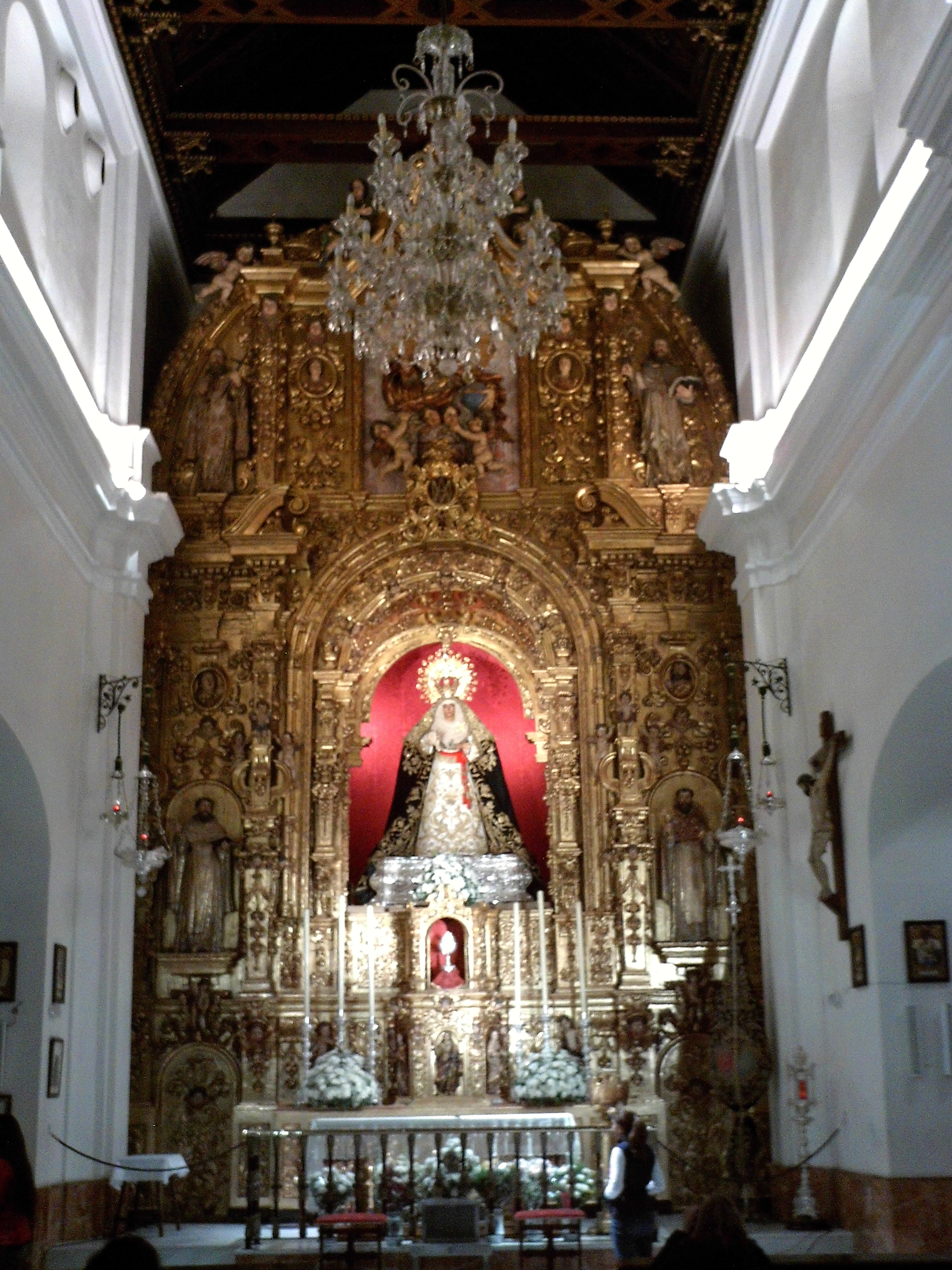 Nave central y altar mayor. Capilla de los Marineros. Sevilla, Andalucía, España.